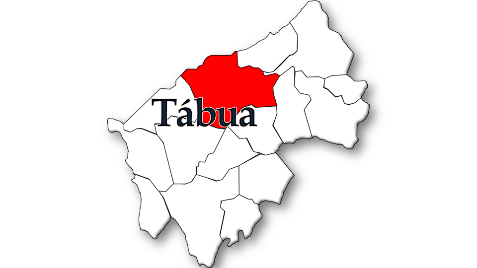 População